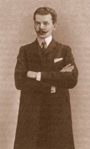 Маковский, Сергей Константинович